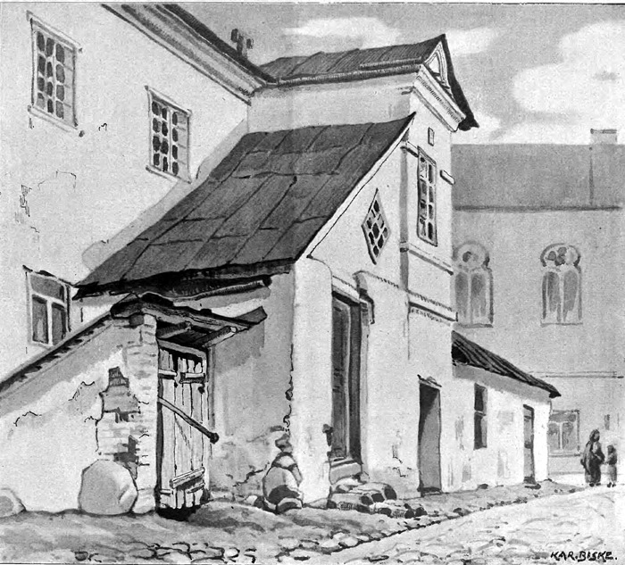 Беларуская (тарашкевіца): Менск (Miensk), палац Сапегаў (Sapieha)